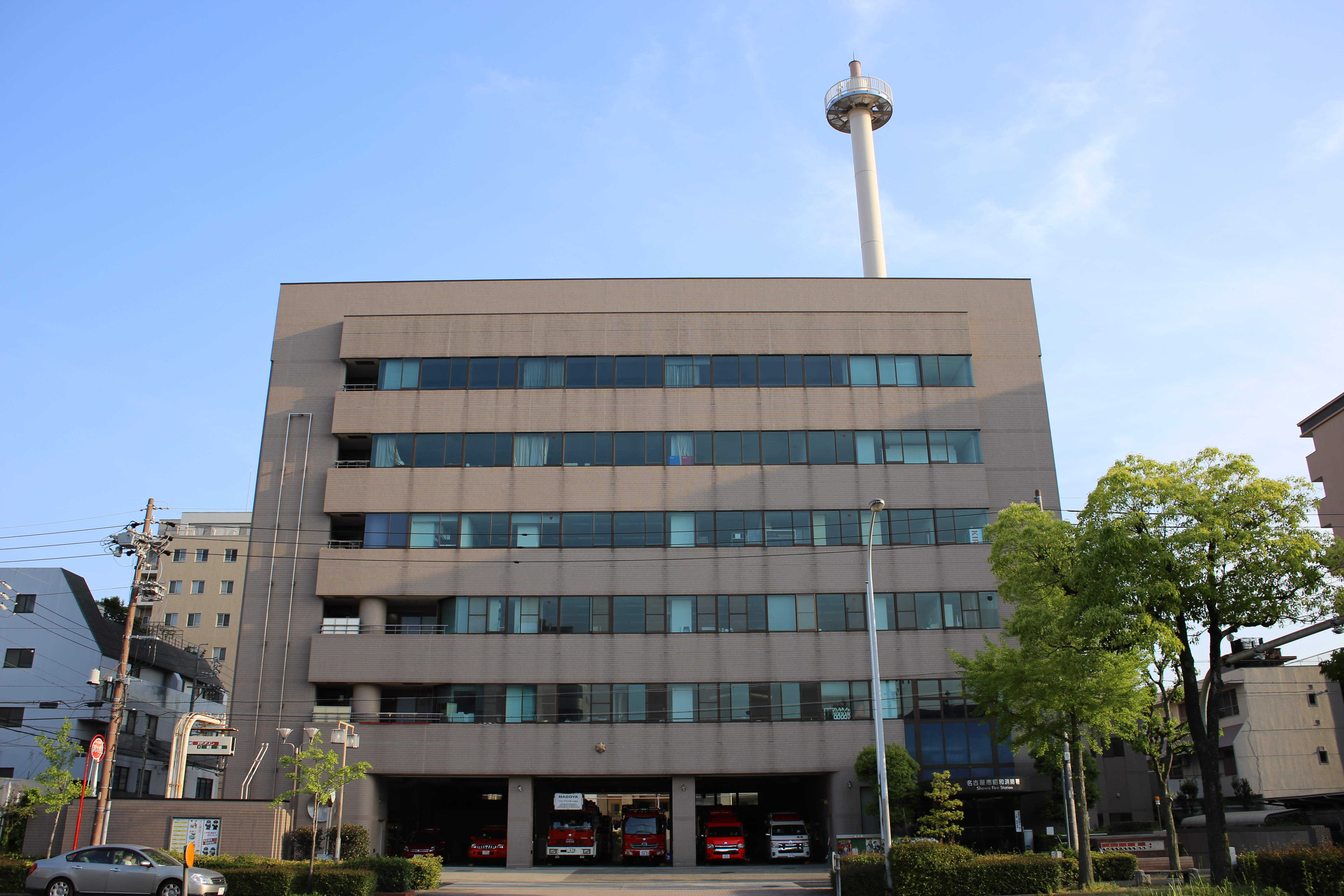 名古屋市昭和区御器所通の名古屋市消防局昭和消防署を北側公道より撮影